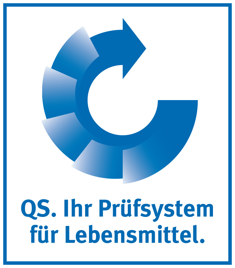 Logo des QS-Prüfzeichens